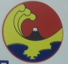 1st Traning Brigade logo（日本著作権法13条によりPD）